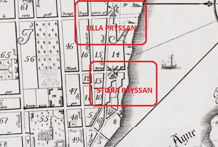 Petrus Tillaeus, del av karta från 1733 visande kvarnarna "Lilla Pryssan" (e) och "Stora Pryssan" (f).